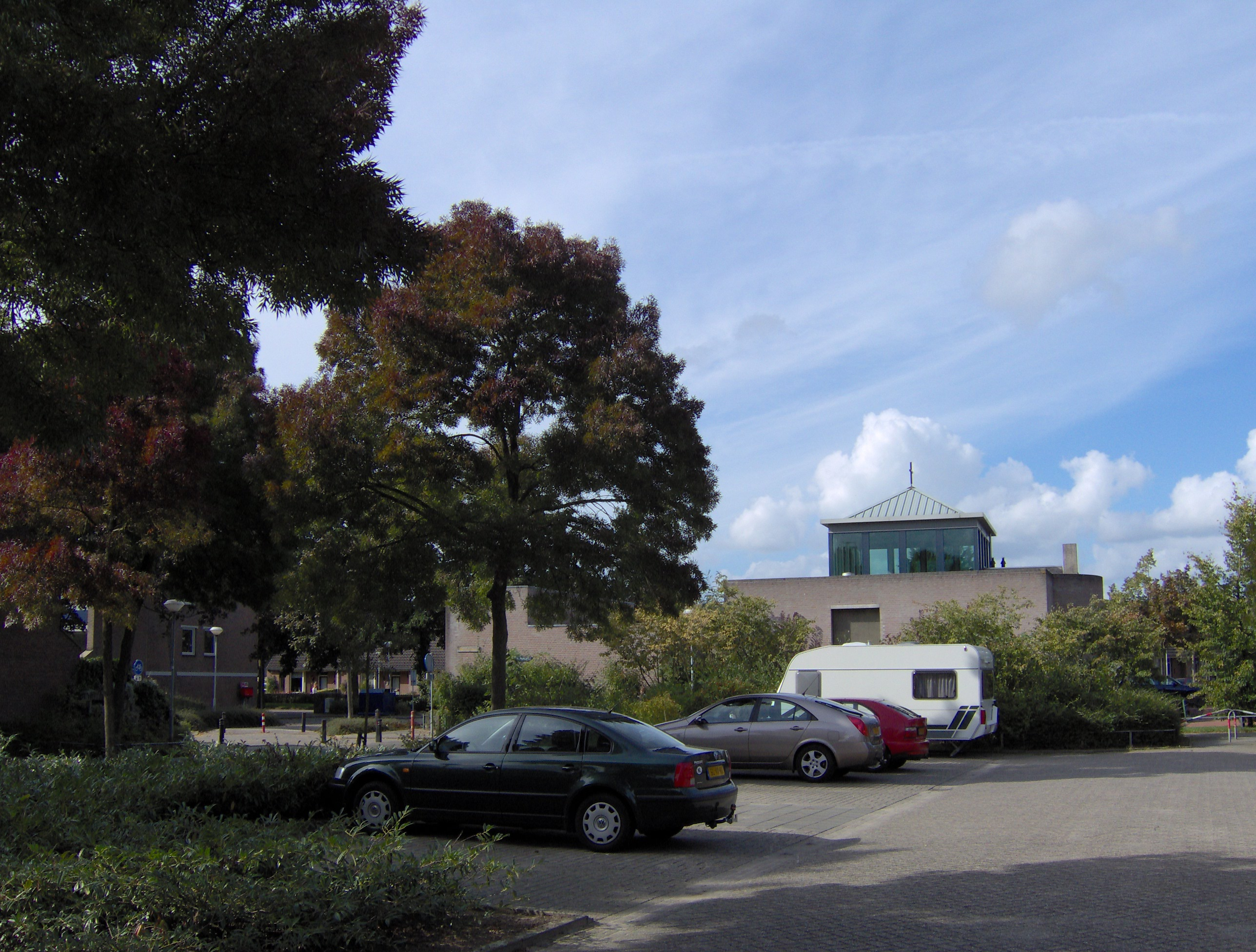 eigen foto categorie:afbeelding 's-Hertogenbosch